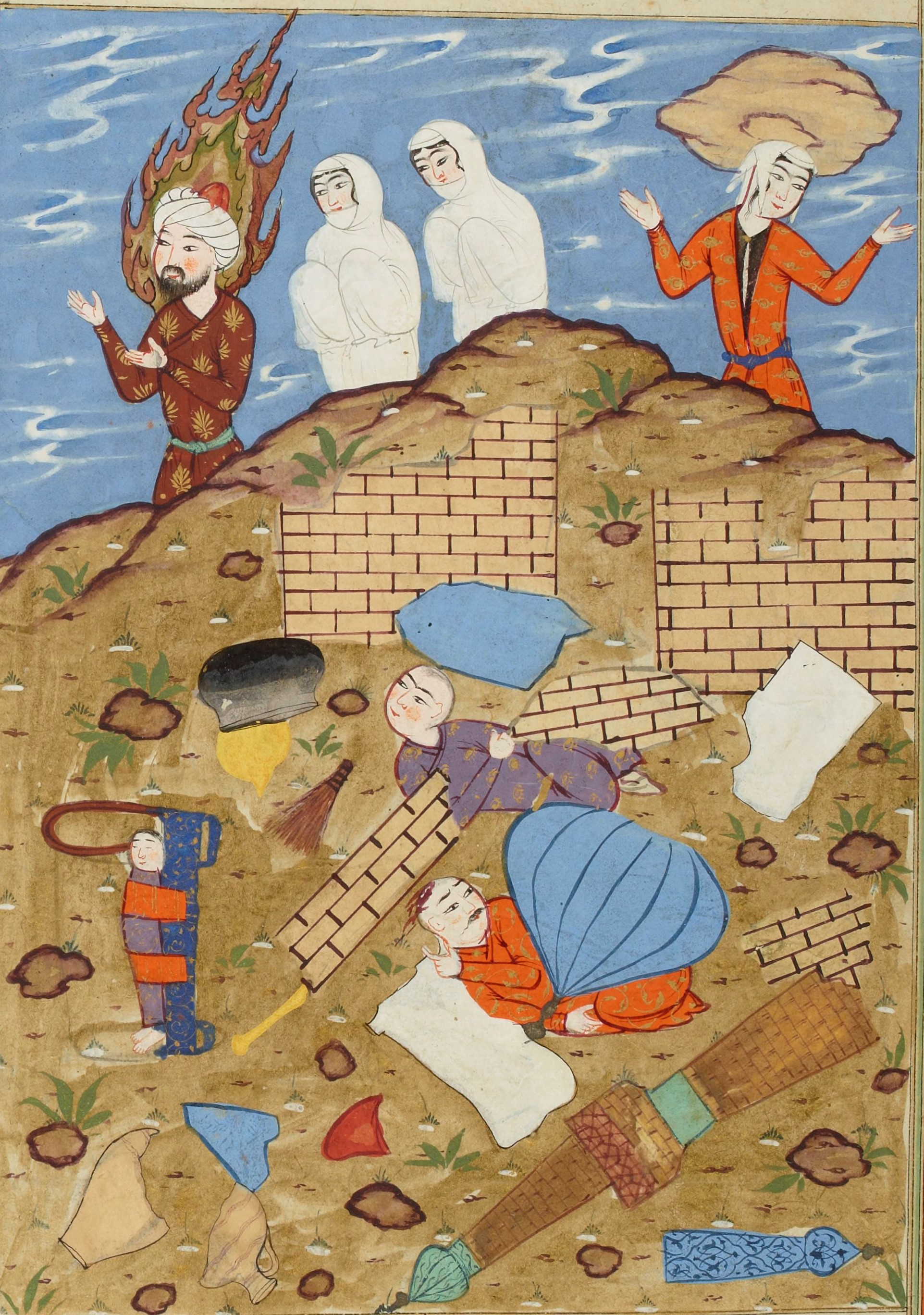 Lūṭ (Loth) s'enfuit suivi de ses filles ; sa femme reçoit une pierre sur la tête ; ruines des cités détruites[1]